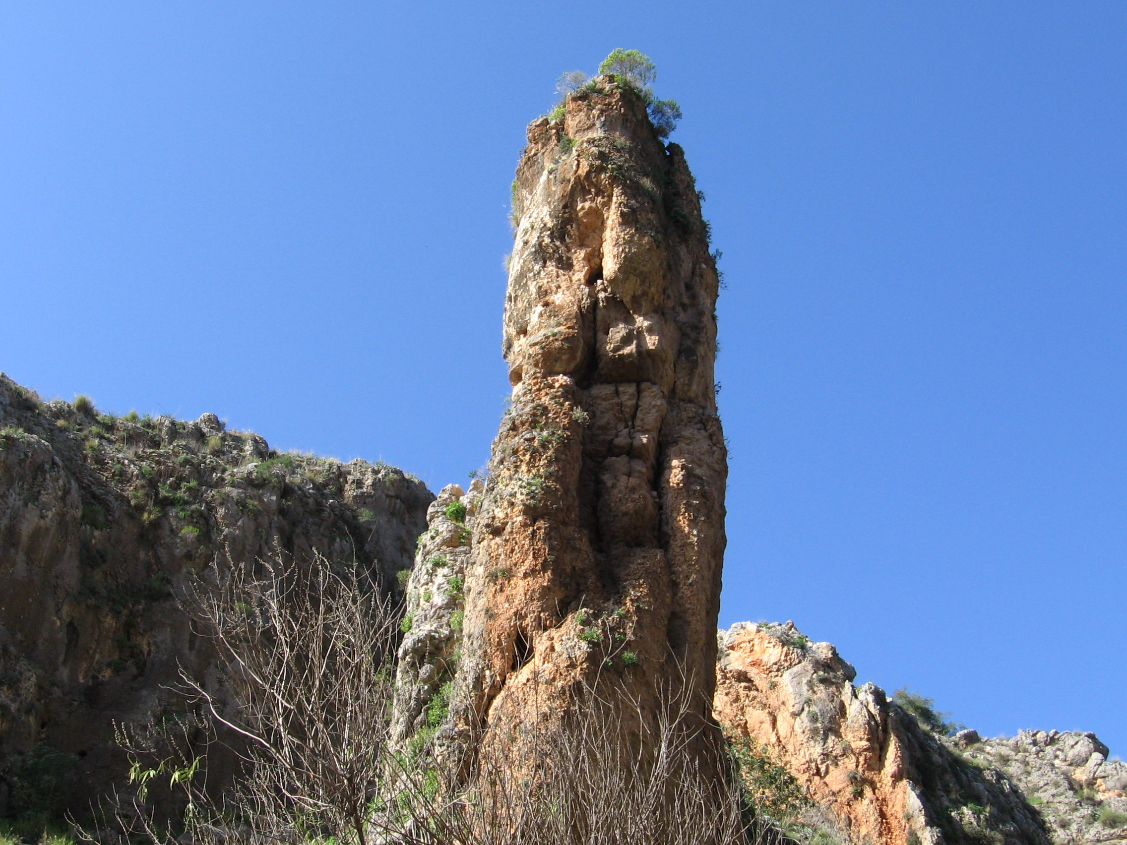 "העמוד" בנחל עמוד